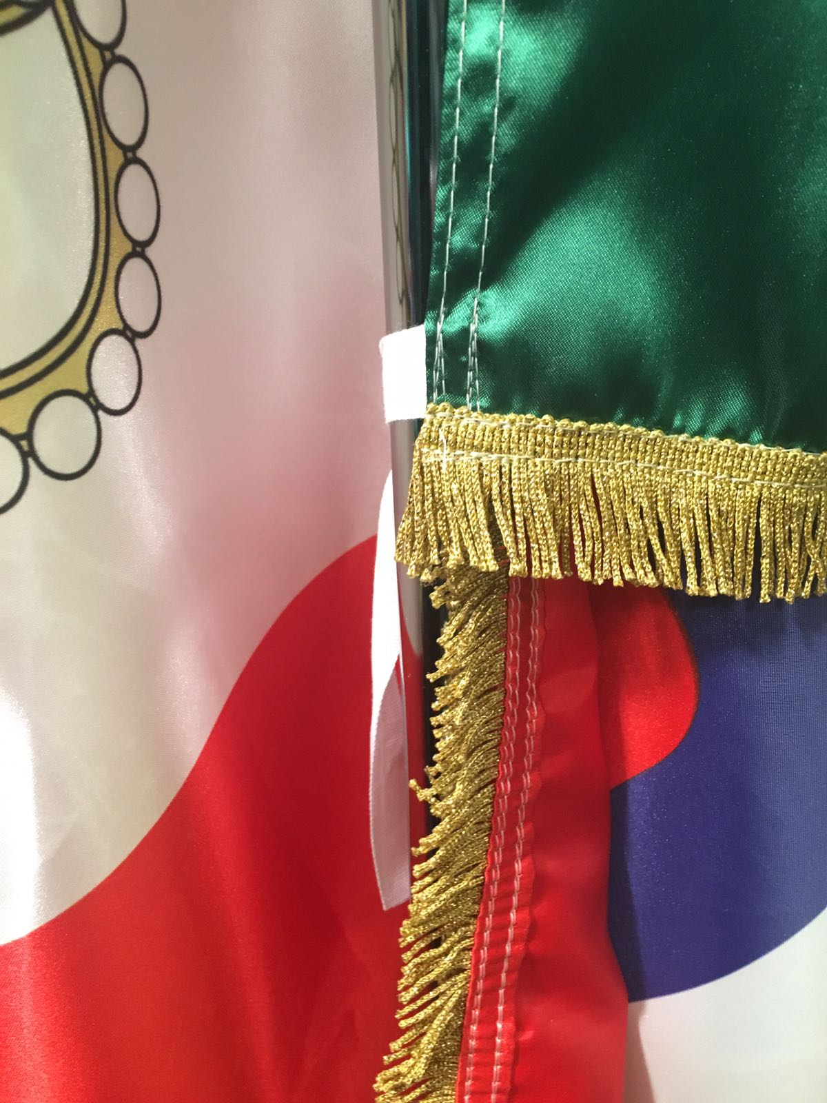 Dettaglio della frangia oro di una bandiera in raso; la bandiera di stato del Regno d'Italia (1861-1946)